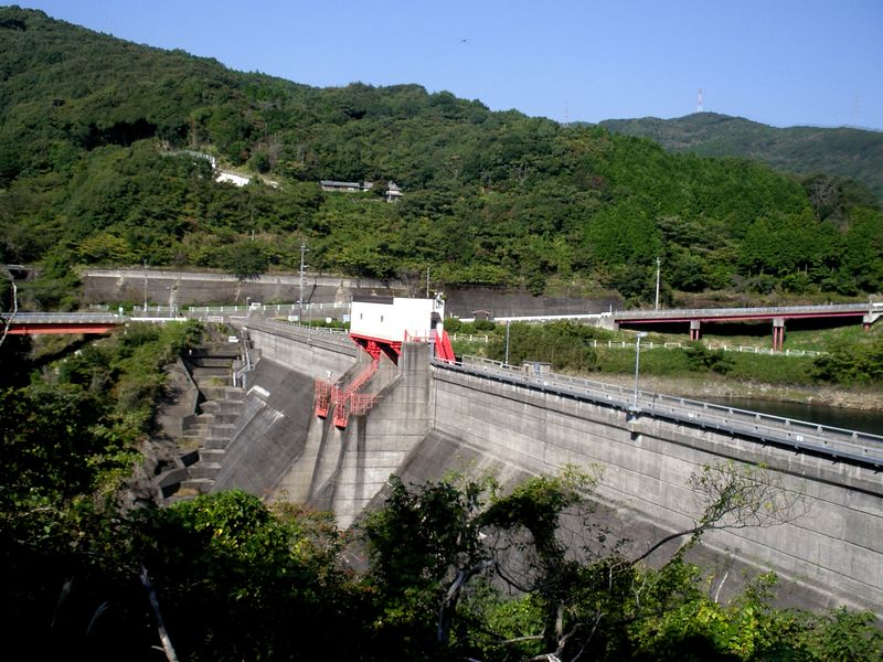 神浦ダム堤体。長崎市・神浦川上流(Konoura-dam. Konoura, Nagasaki)